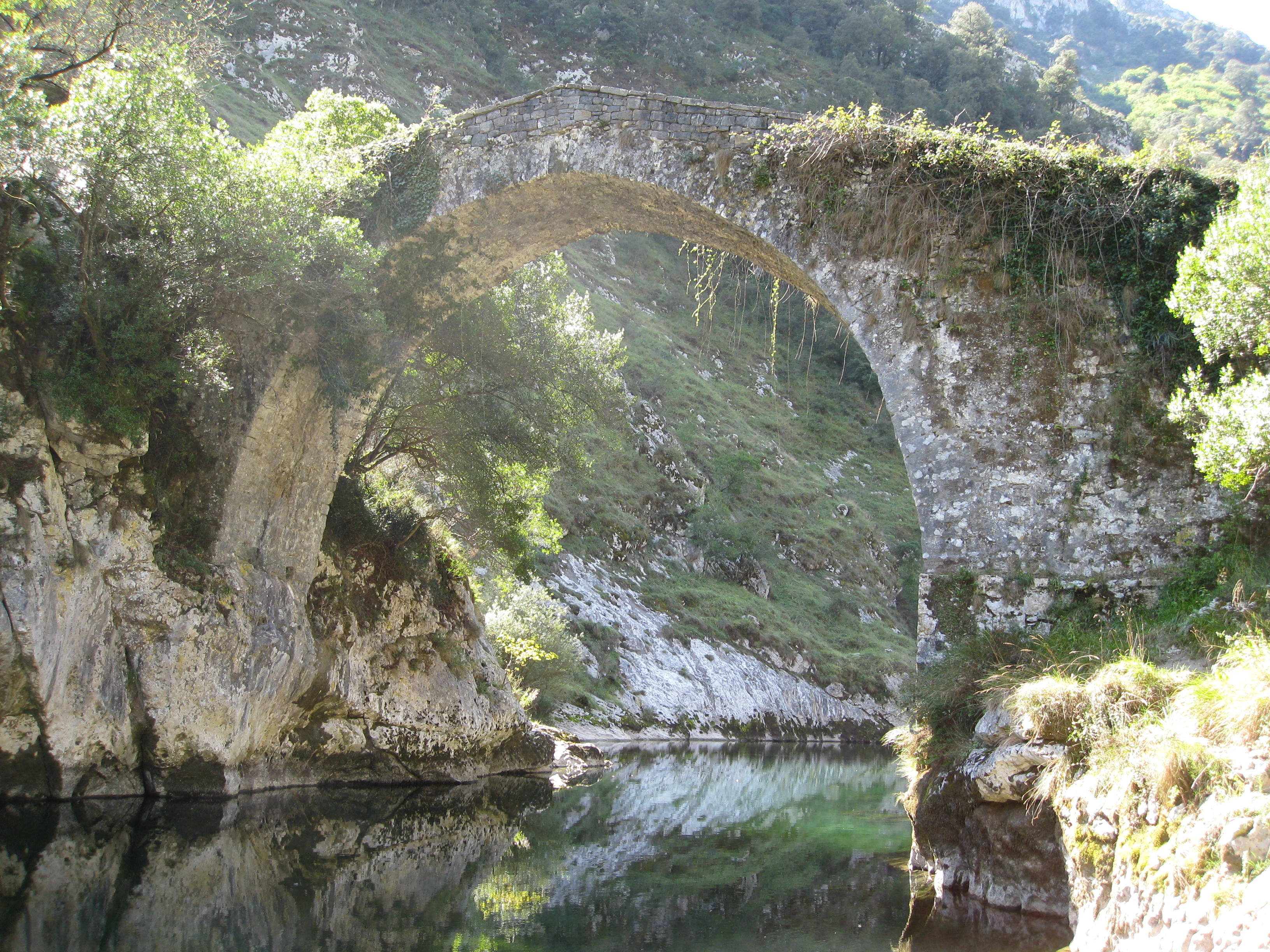 Puente romano de La Vidre, Trescares, Peñamellera Alta